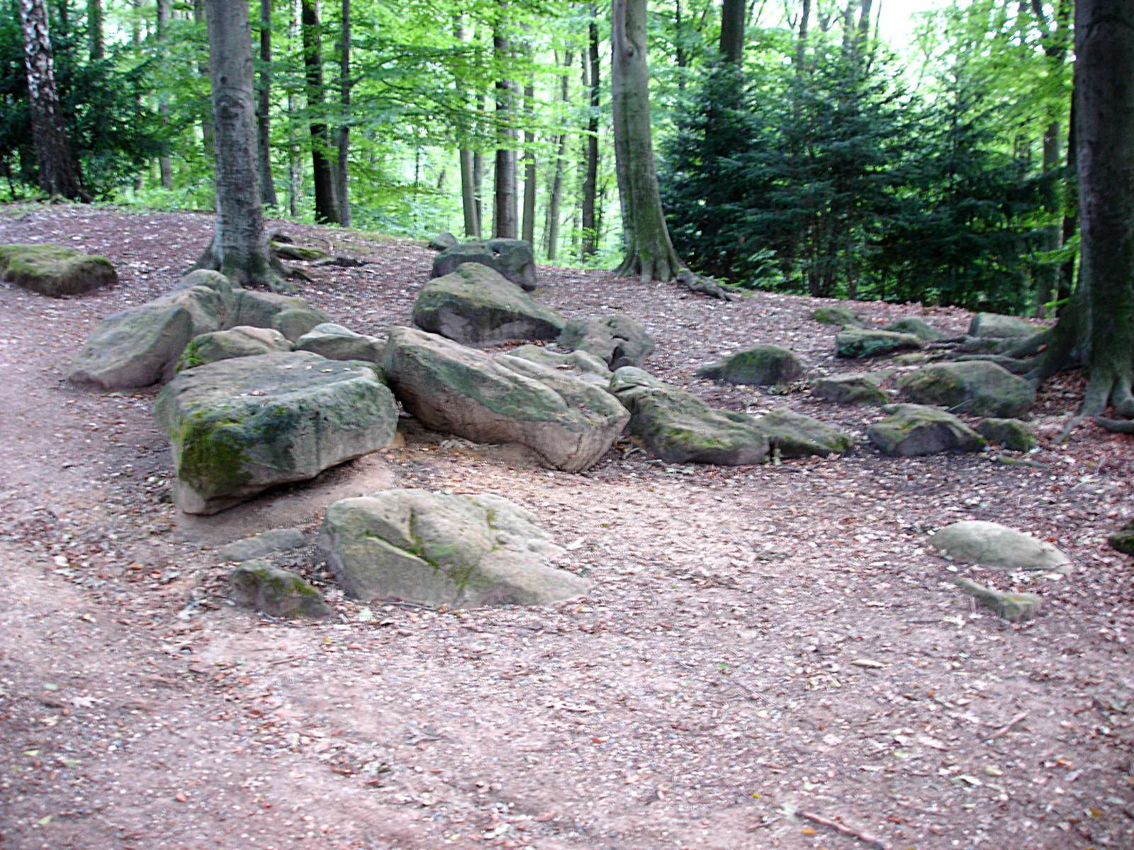 Die "Frauensteine", eine Gesteinsgruppe in dem zu Düsseldorf gehörenden Aaper Wald.